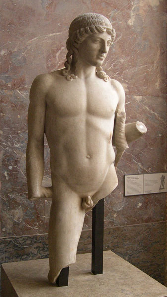 Apol·lo tipus Màntua, segons un original grec del segle V aC atribuït a Hégias d’Argos. Obra romana del segle I o II dC